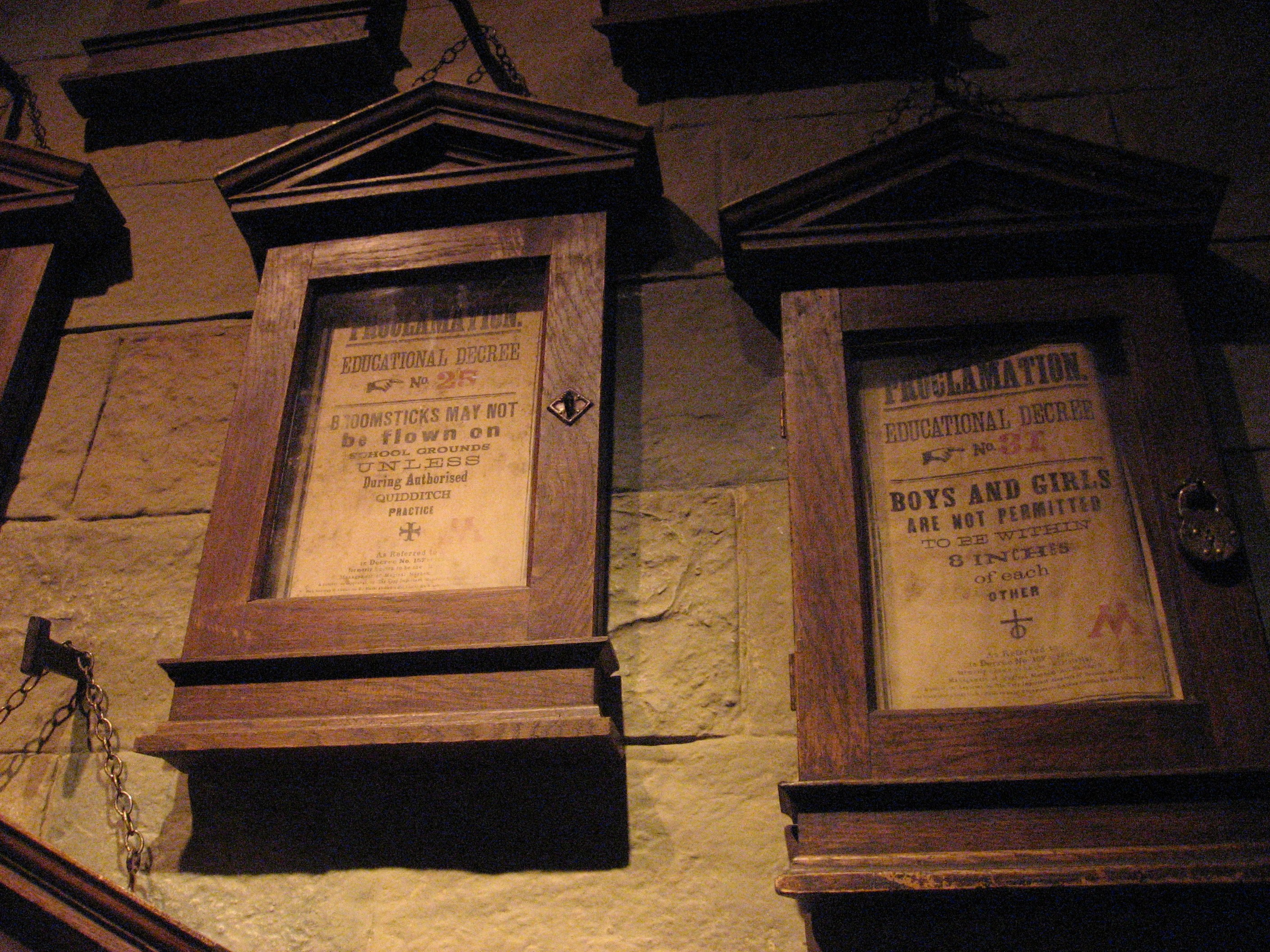 Décrets d'éducation du professeur Ombrage, Harry Potter Exhibition, Cité du Cinéma, Saint Denis (Paris) avril 2015